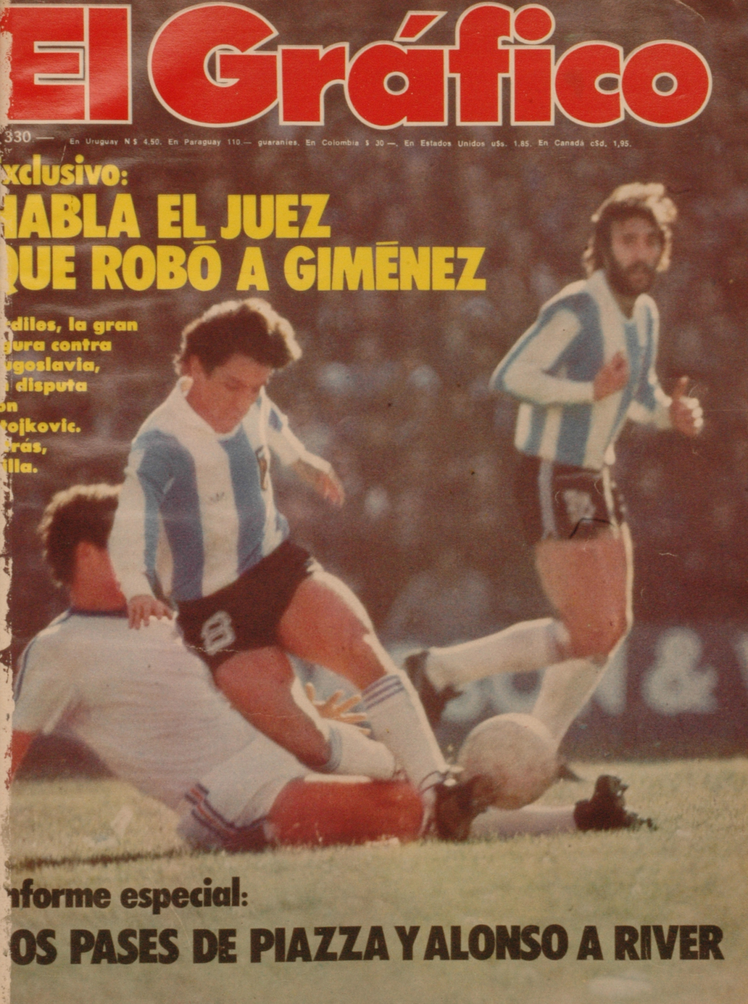 El Grafico del 05 de Julio de 1977. Edicion 3013